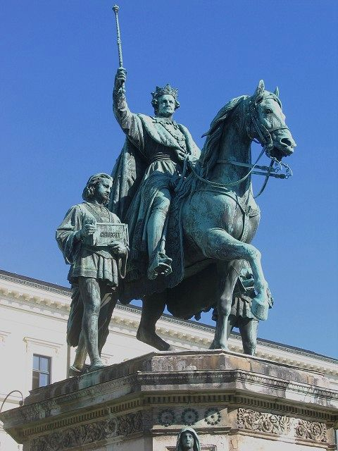 Reiterdenkmal Ludwig I, Odeonsplatz Muenchen, Max von Widnmann 1862